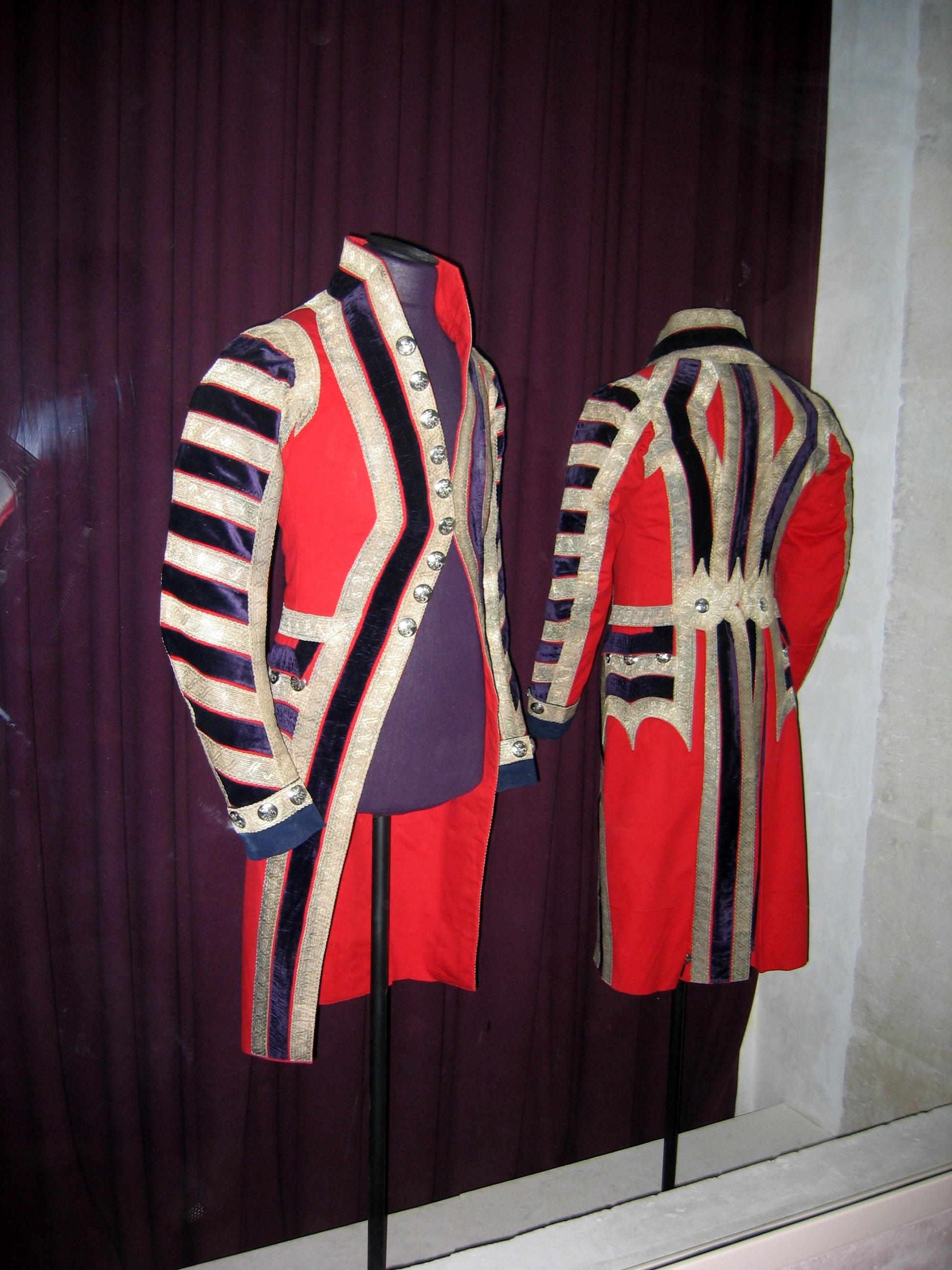 Tenue des domestiques, exposées dans le petit Trianon